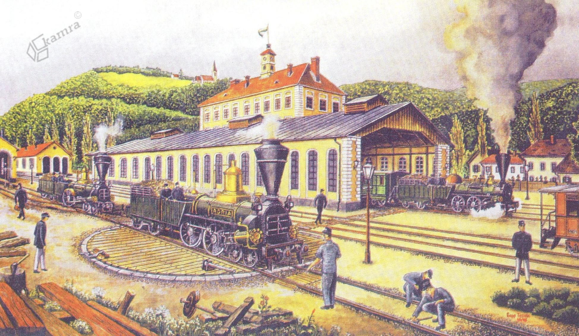 Železniška postaja v Celju.